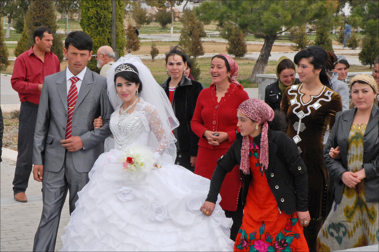 Séance de photographies devant la statue de Tamerlan pour de jeunes mariés ouzbèkes